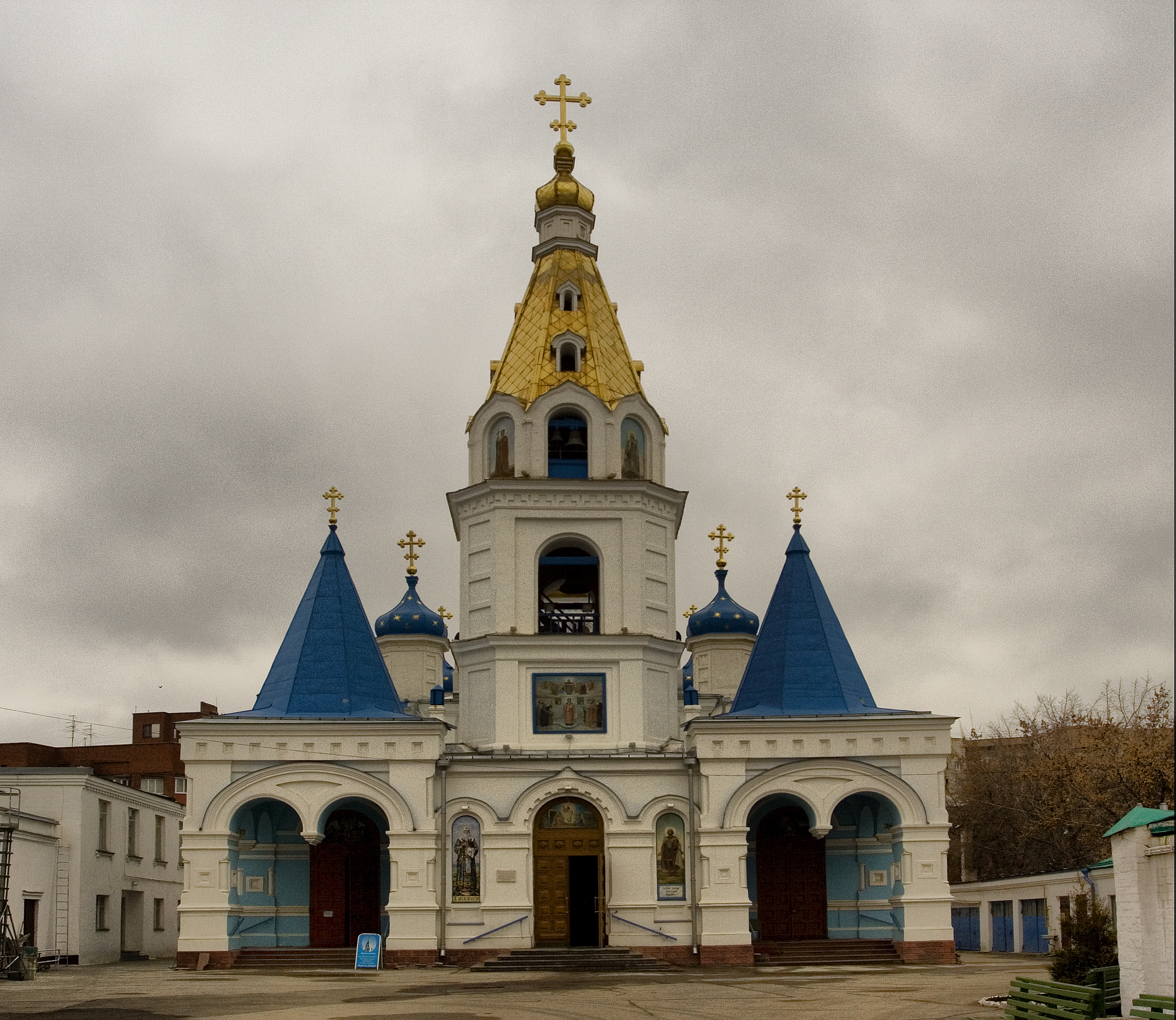 Самара, Кафедральный собор в честь Покрова Божией Матери